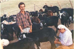 kişisel resim